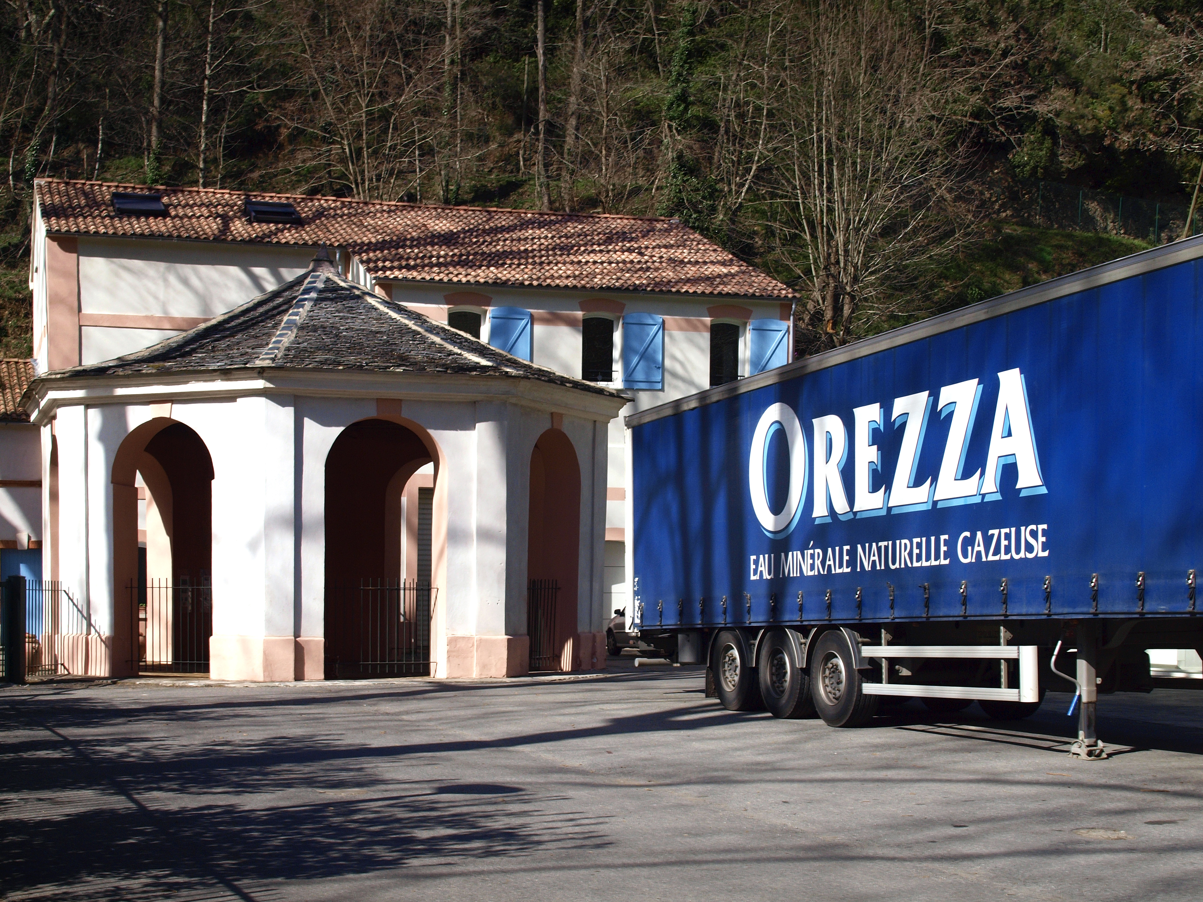 Rapaggio, Castagniccia (Corse) - Les thermes d'Orezza